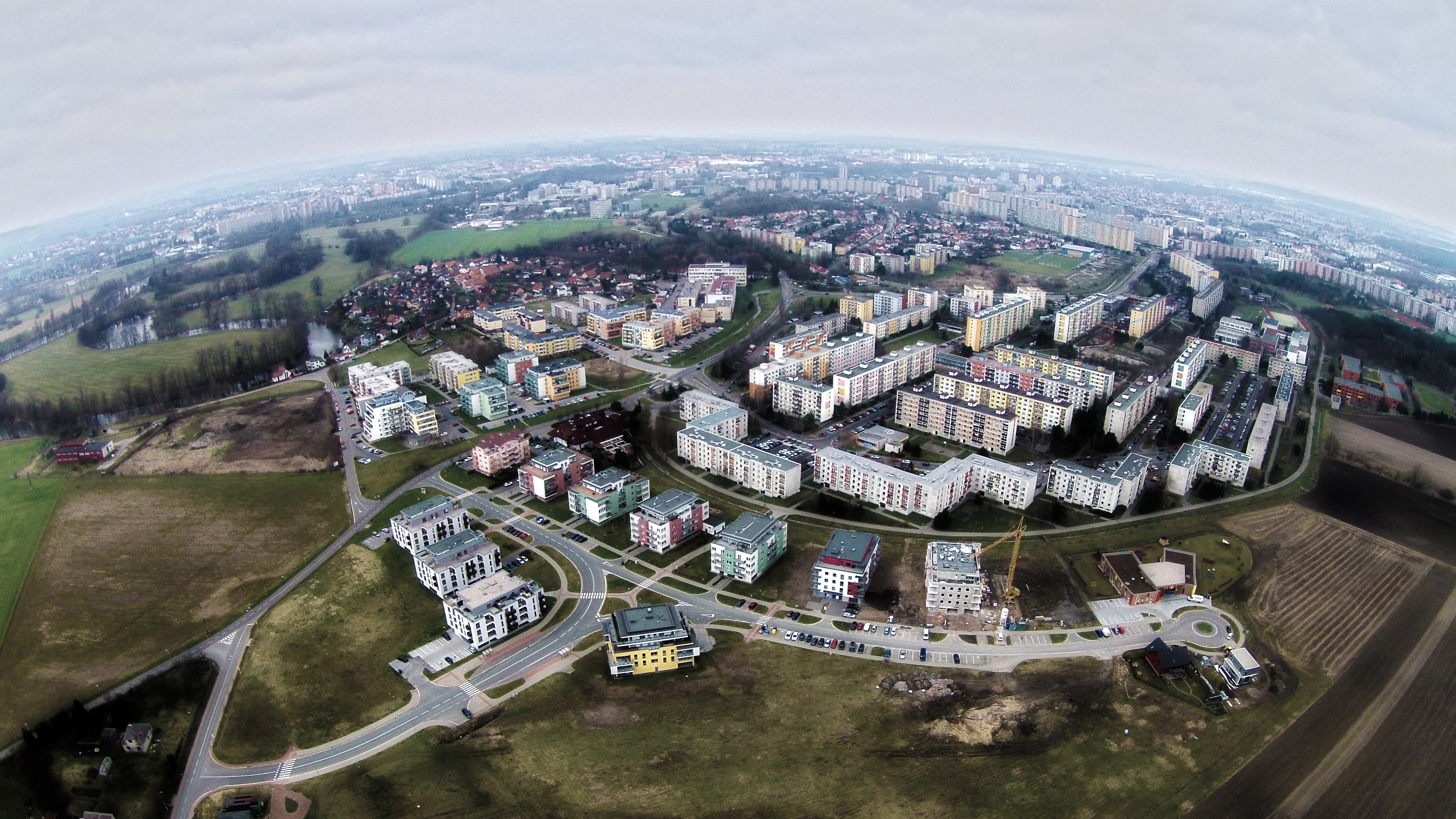 Letecký pohled na místní část Moravské Předměstí (katastrální území Třebeš) v Hradci Králové